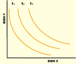 Curvas de indiferencias 1